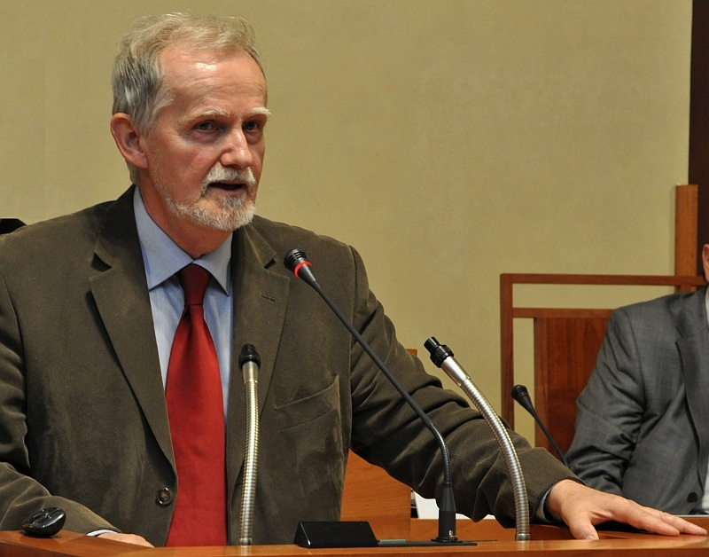 Josef Štulc, Veřejné slyšení v Senátu Parlamentu ČR 23.9.2011 (k otázce ochrany historické zástavby na Václavském náměstí v Praze).